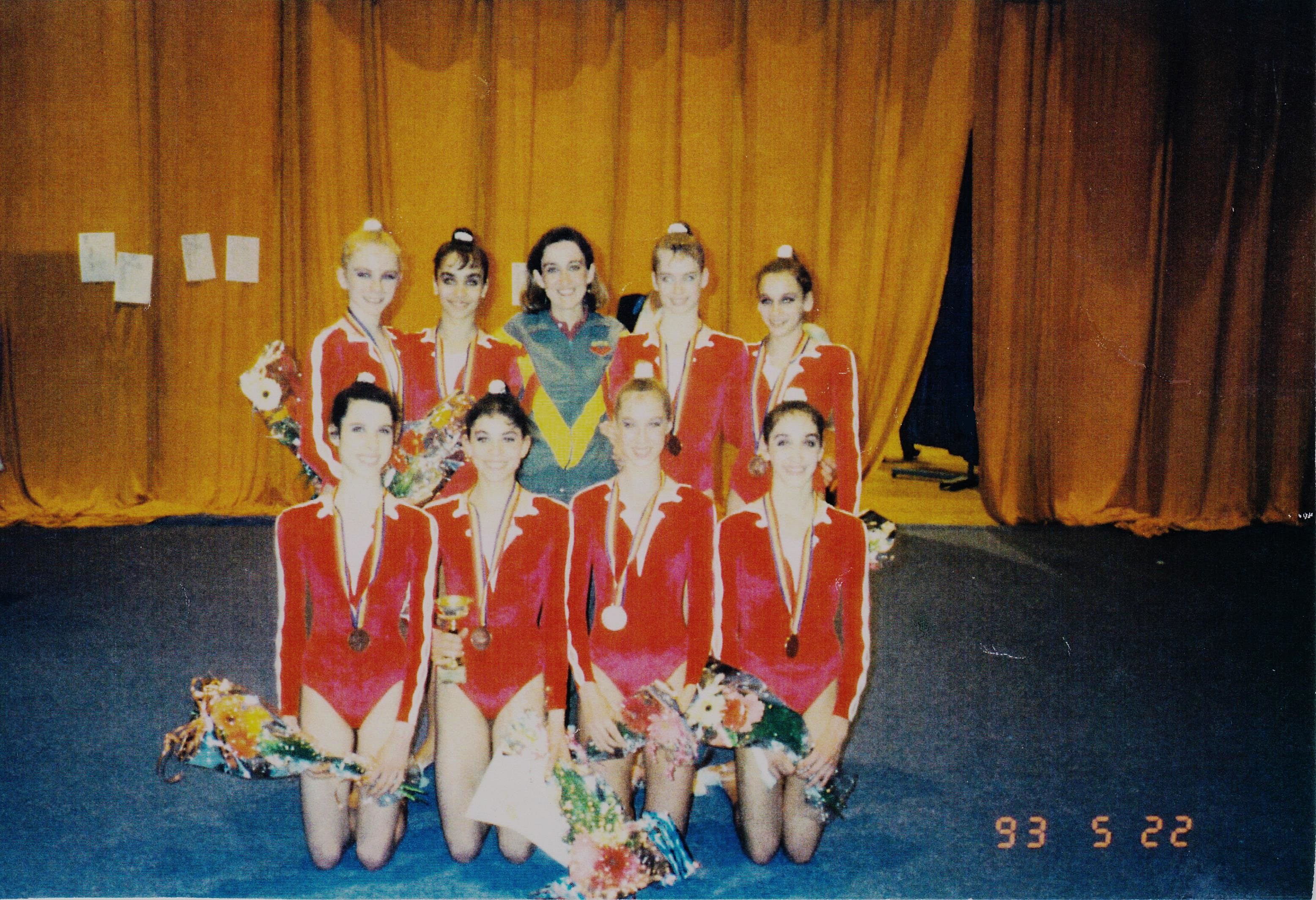 El conjunto español de gimnasia rítmica en el Campeonato Europeo de Bucarest en 1993. De pie, de izquierda a derecha: Bárbara Plaza, Pilar Rodrigo, María Fernández Ostolaza (entrenadora), Maider Olleta y Regina Guati. Delante: Alicia Martín, Cristina Martínez, María Álvarez y Carolina Borrell.